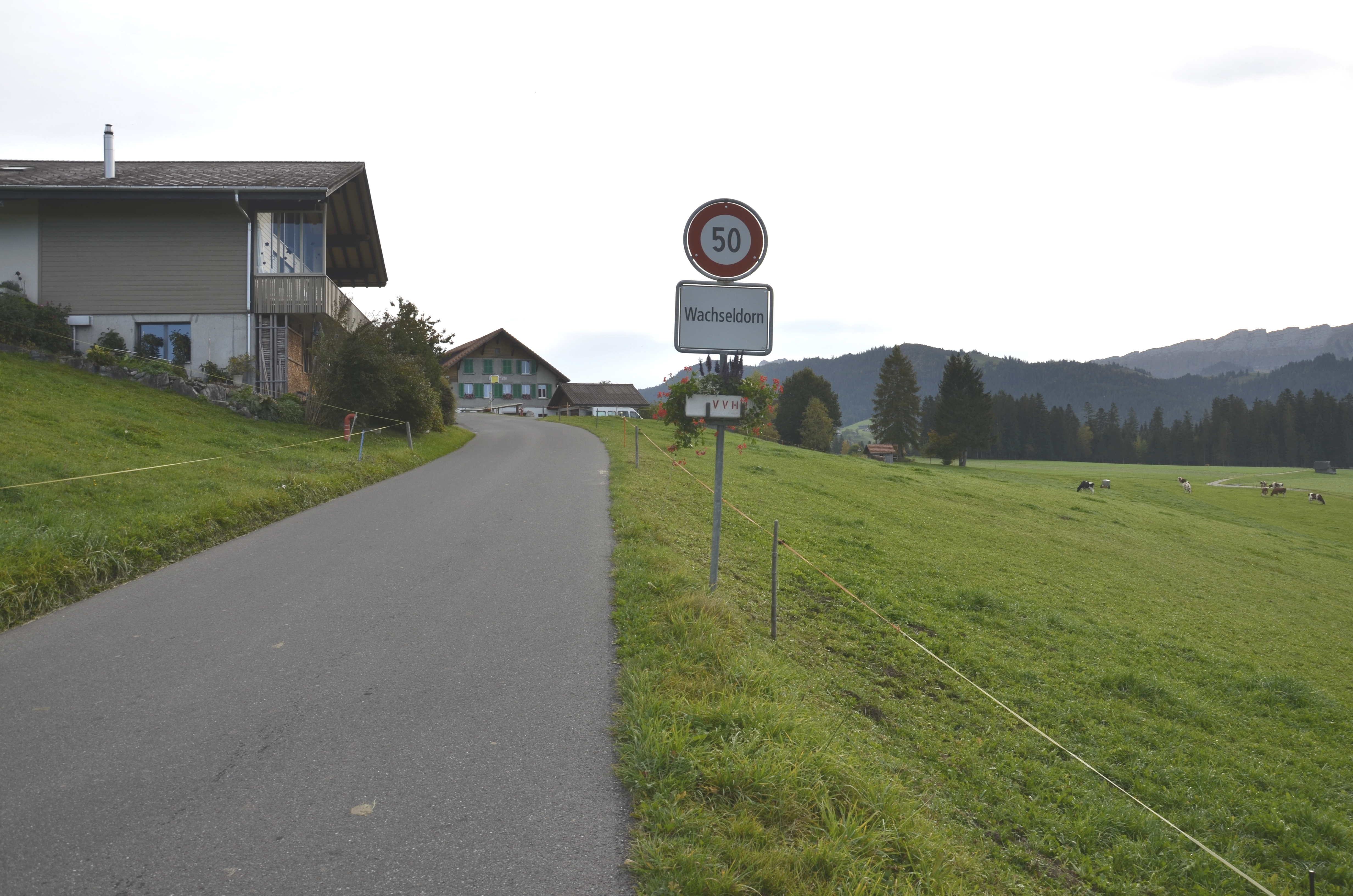 Kanton Bern (Schweiz): Gemeinde Wachseldorn, Ortstafel